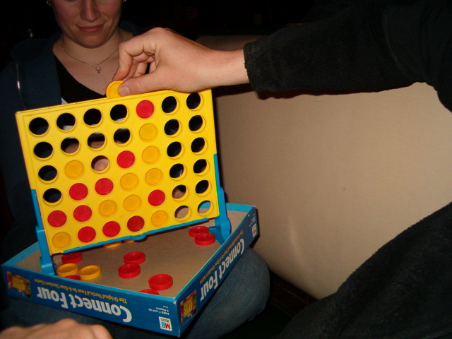 Material und Spielprinzip.